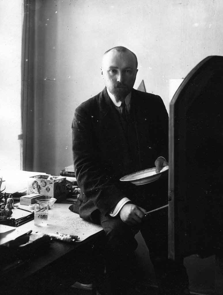 Н.К. Рерих в мастерской. Мойка, 83. Петербург 1910-е г.